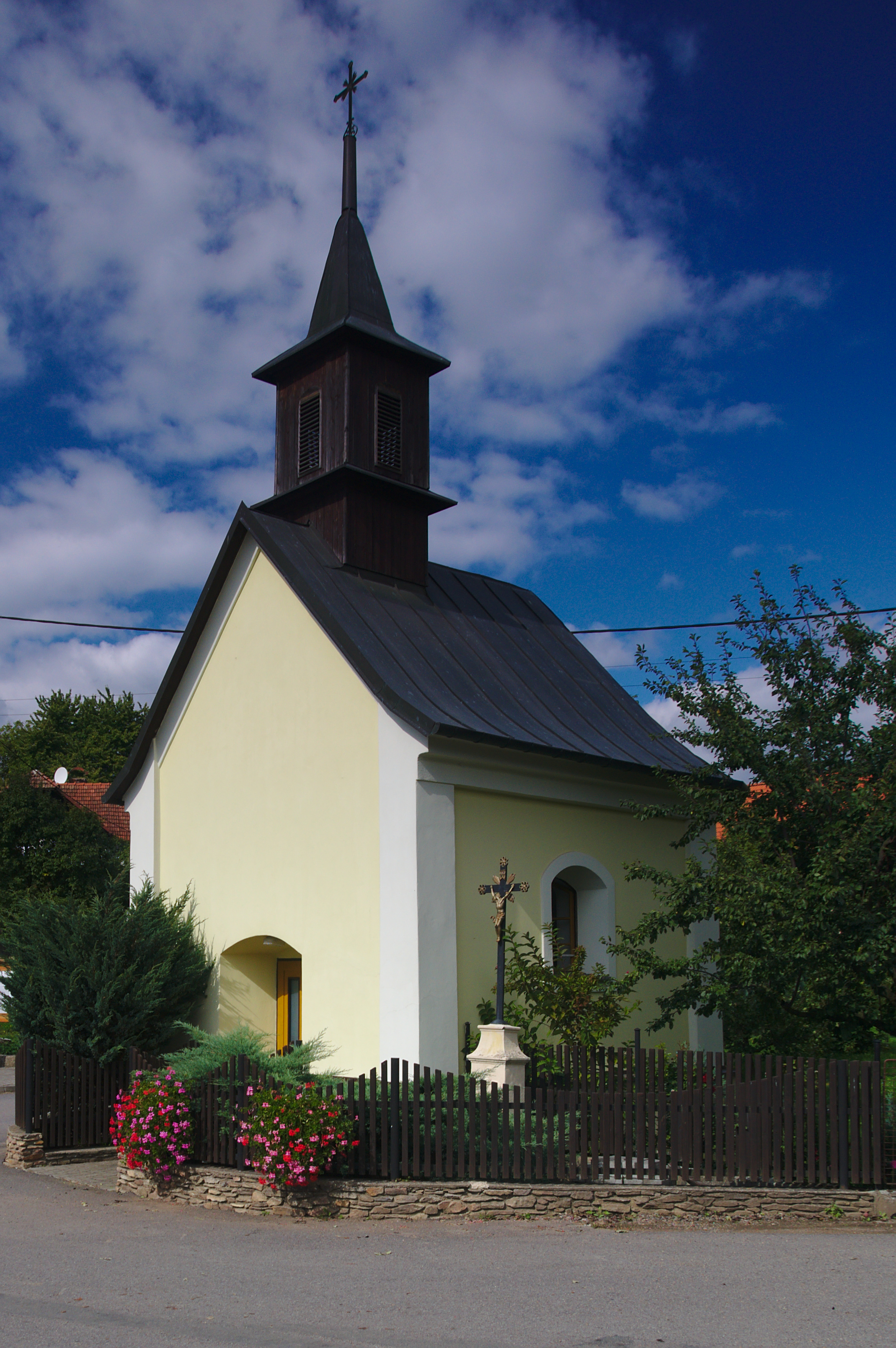 Kaple Panny Marie Růžencové, Strhaře, okres Brno-venkov